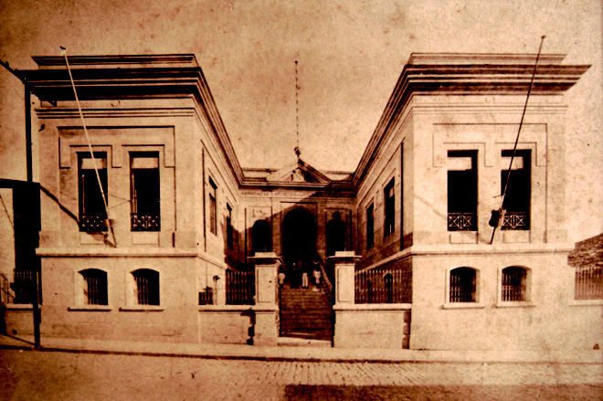 Fachada do prédio da Associação Artística e Literária de Taubaté, construído em 1895.